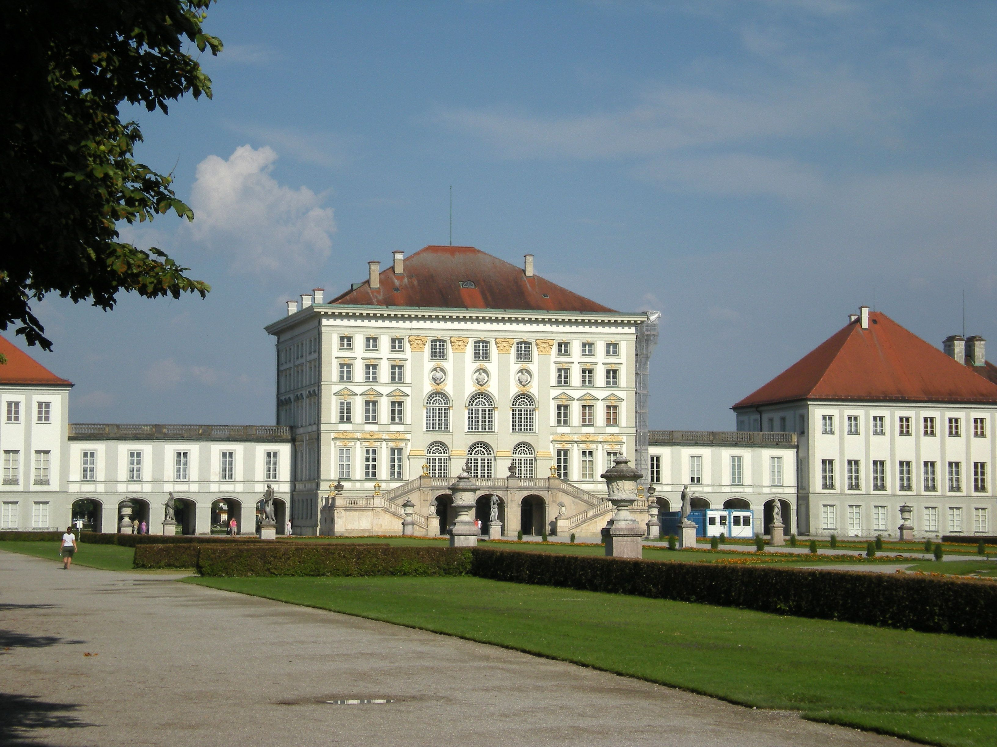 El pabellón central del palacio de Nymphenburg, de estilo neoclásico, tiene cinco plantas. En su interior destaca la Steinerner Saal, que se extiende en dos de los cinco pisos.